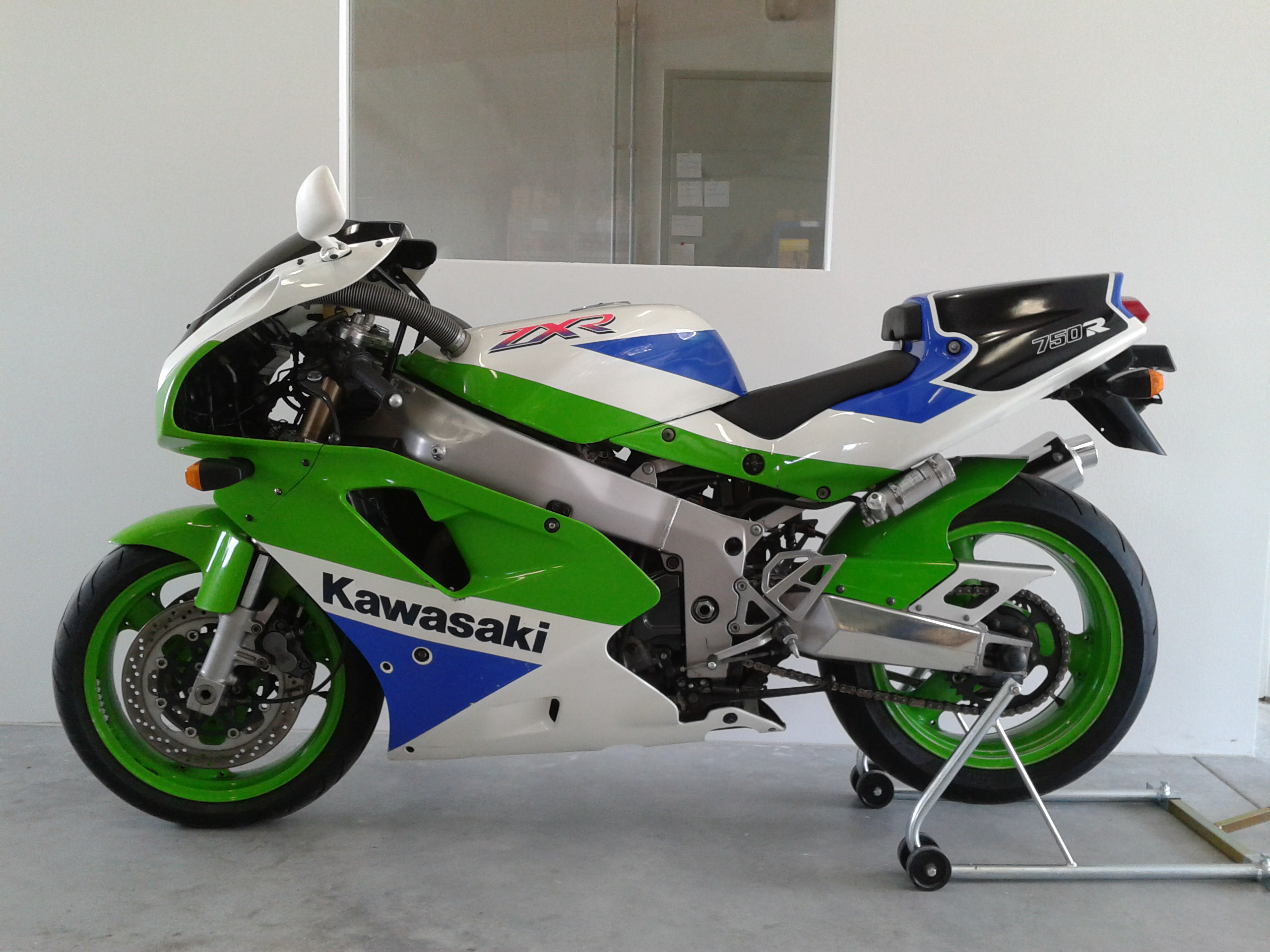 ZXR 750 R/ K Modell Baujahr 1992